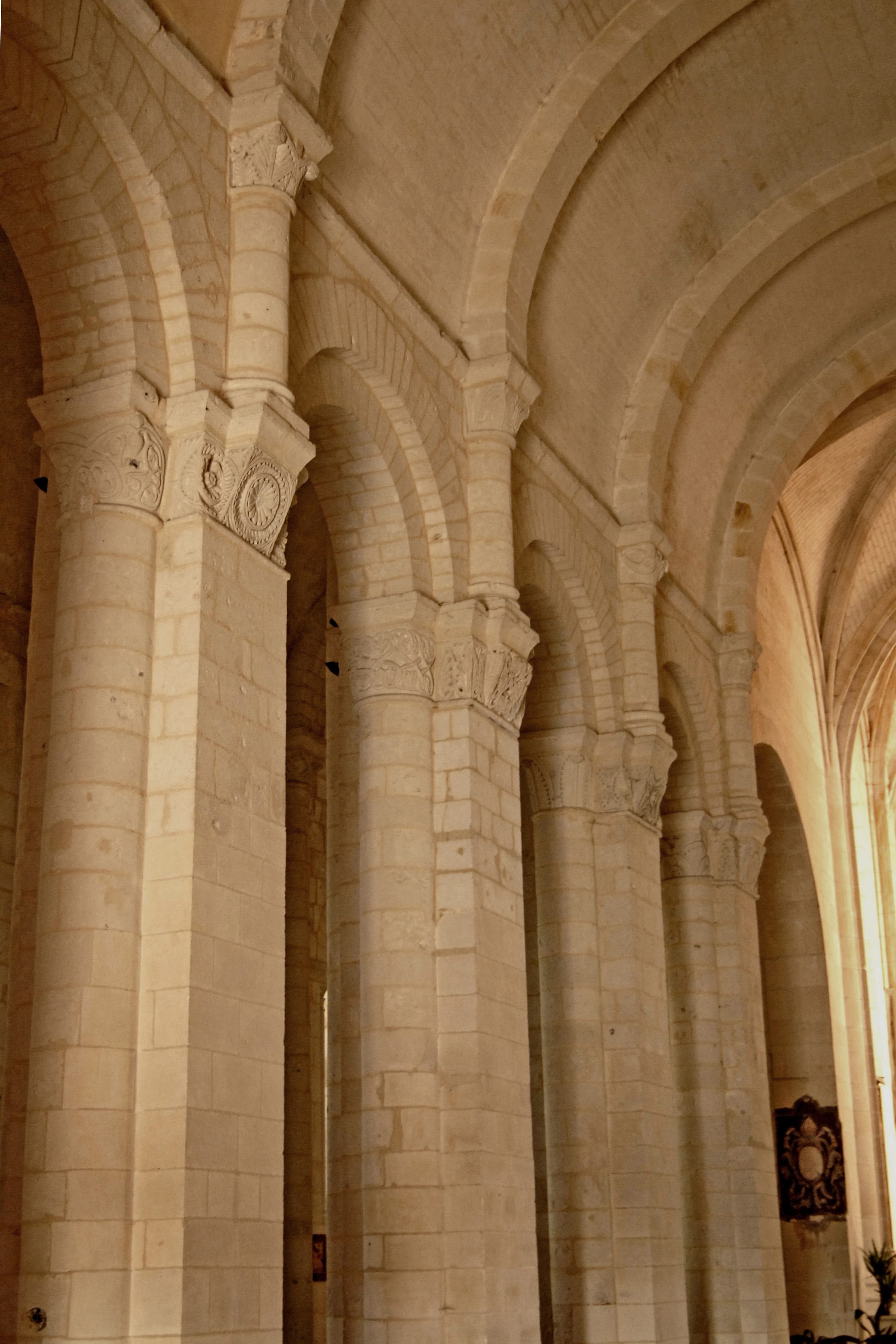 St.-Eutrope, Saintes, Oberkirche, Nordwand Umgangschor